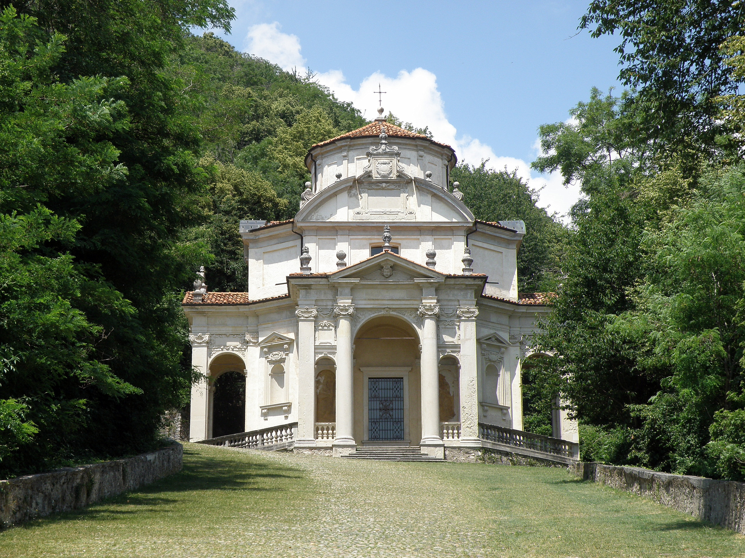 Sacro Monte di Varese: V Cappella, Disputa di Gesù coi dottori.